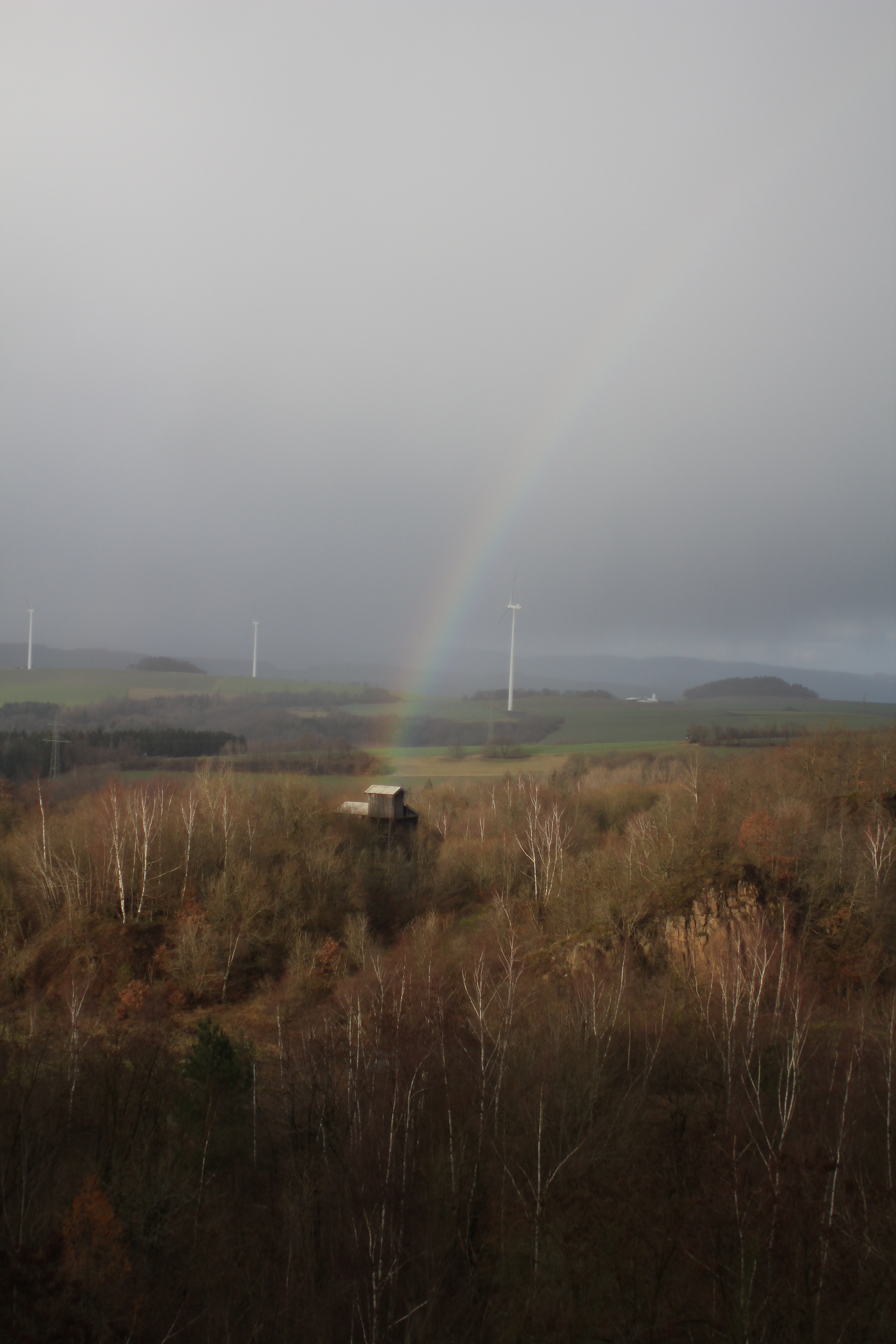 Steinbruch Herschweiler-Pettesheim